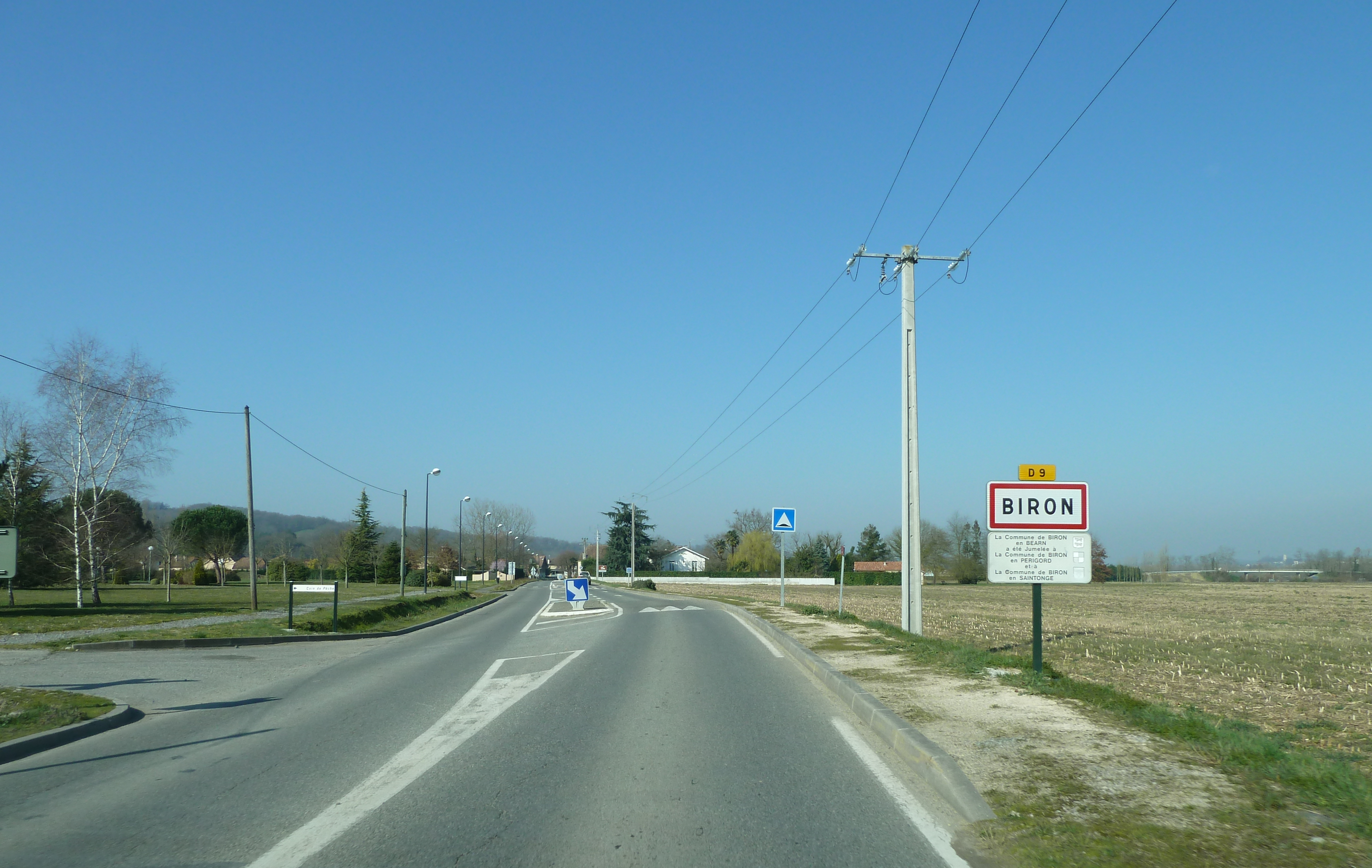 Entrée dans Biron (Pyrénées-Atlantiques)